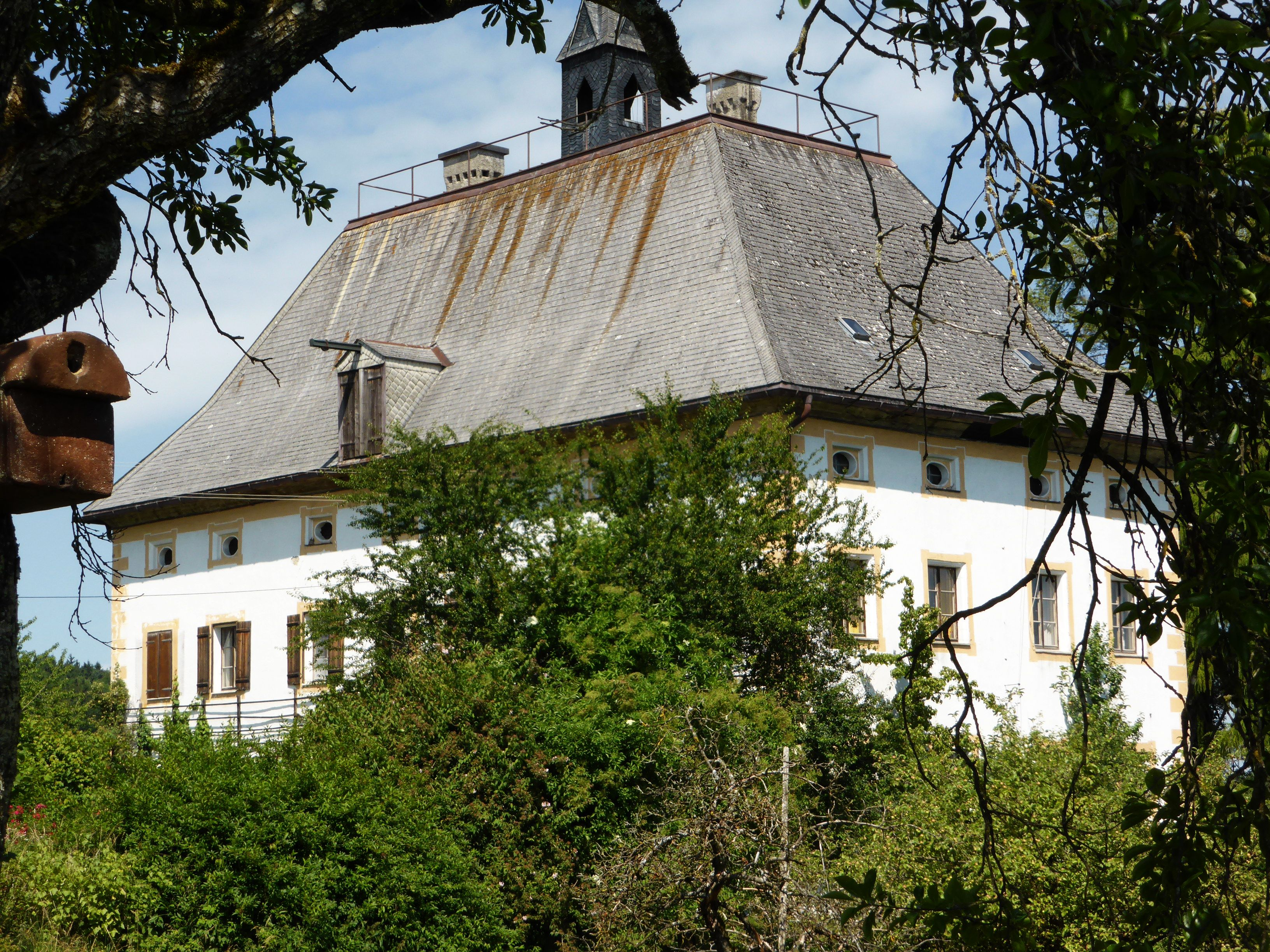 Schloss Seehaus